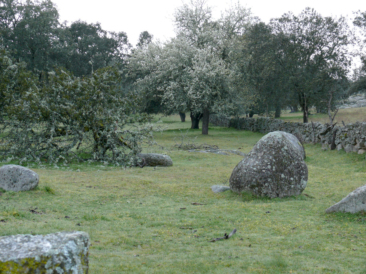 Bolos de granito cerca de Azuel